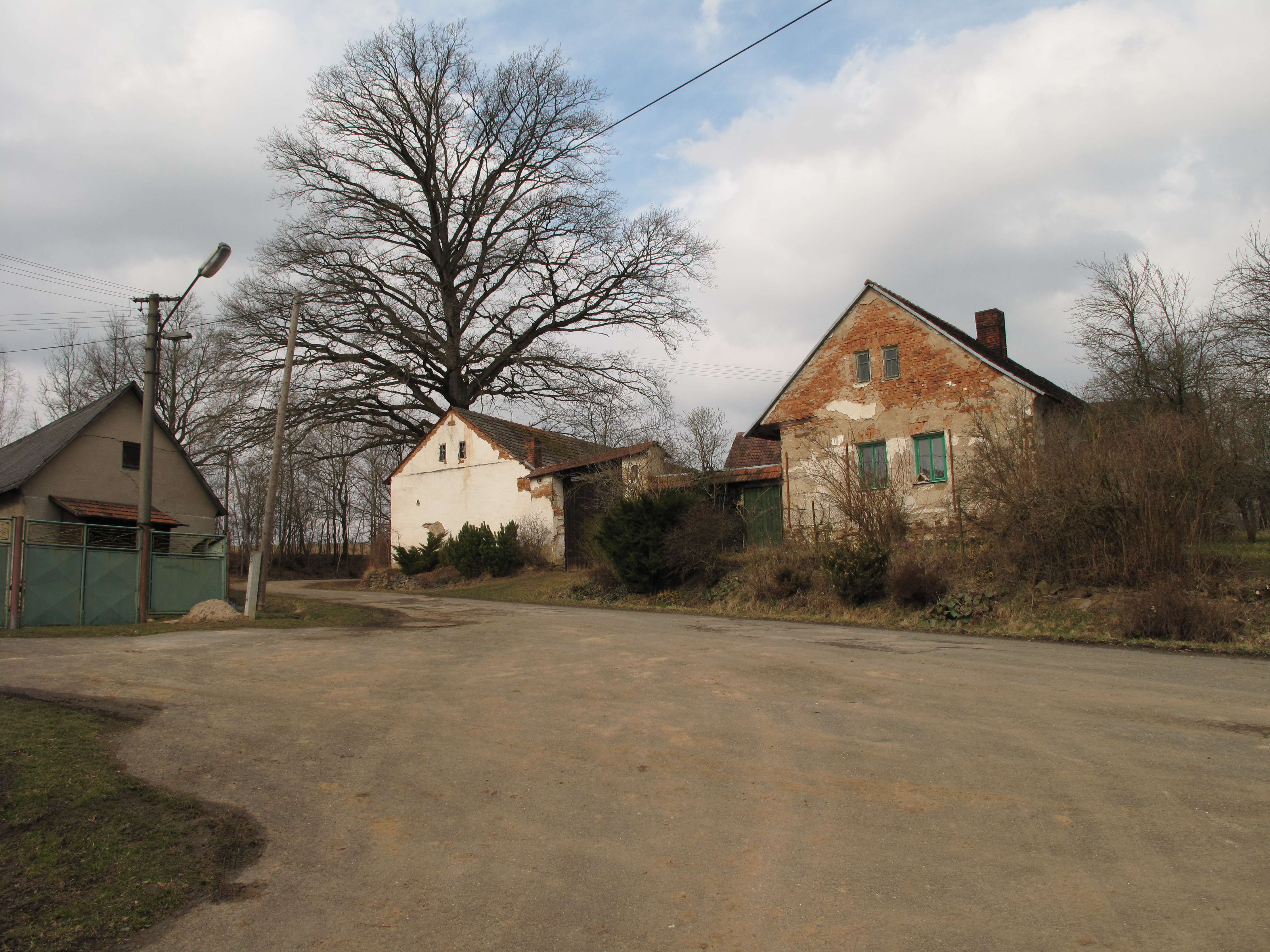 Domy v Habrovčicích. Okres Havlíčkův Brod, Česká republika.